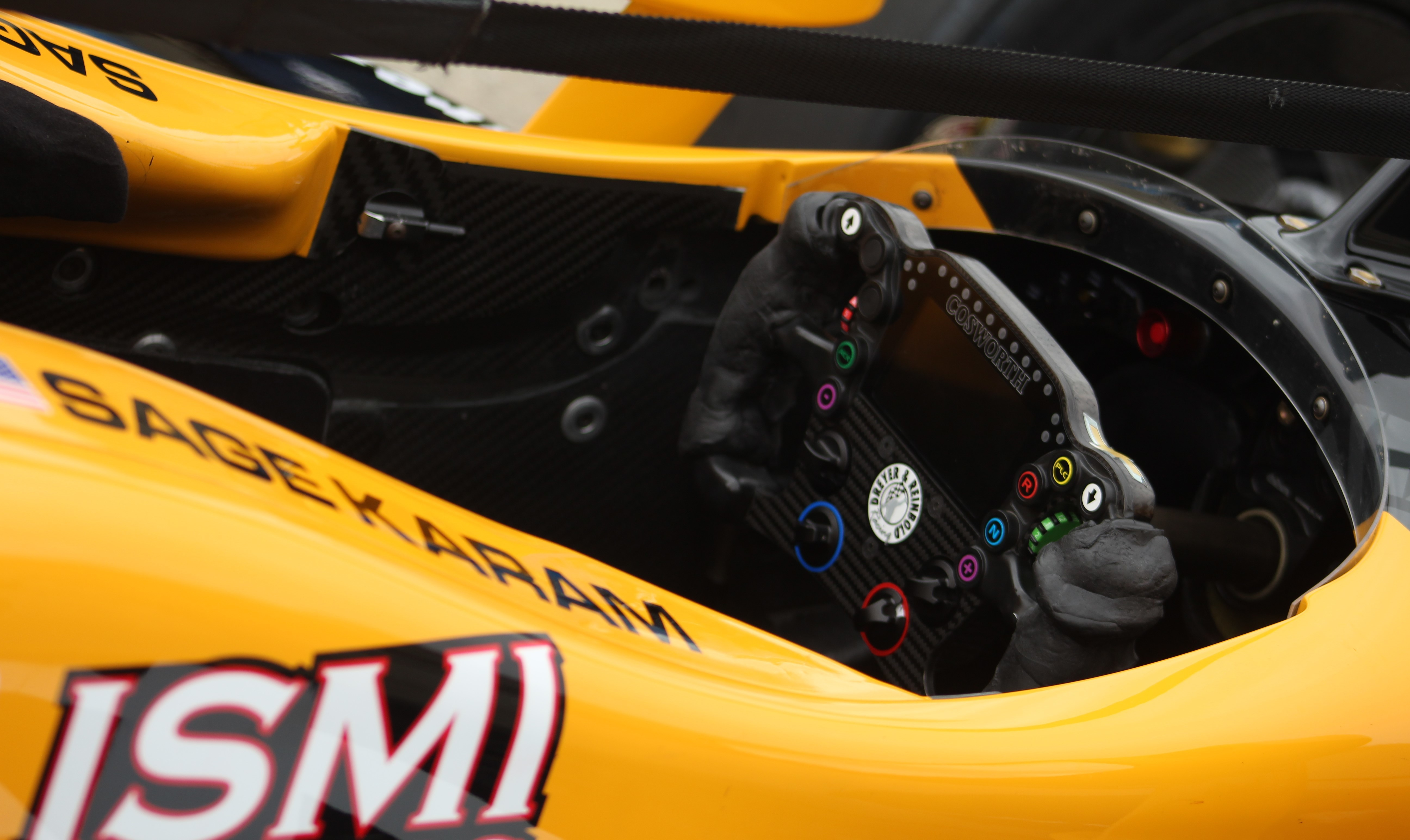 2019 Indianapolis 500